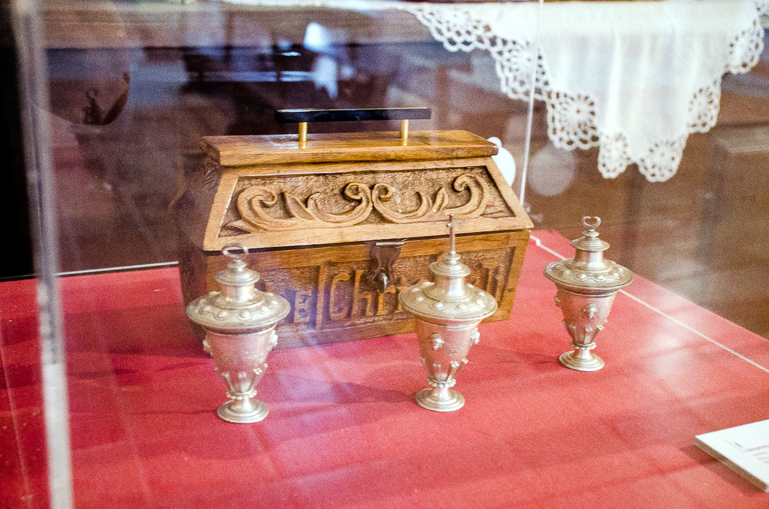 Crismeras. Anónimo. Plata en su color. Siglo XVI. Arqueta del siglo XX. Dimensiones: Arqueta 15 x 25 x 10 cm. Crismeras 12 x 7 x 3 cm (diámetro de la base). Parroquia de Santa María la Real, de Sasamón. Exposición de arte sacro «Sementera de Esperanza», Melgar de Fernamental, julio de 2020.